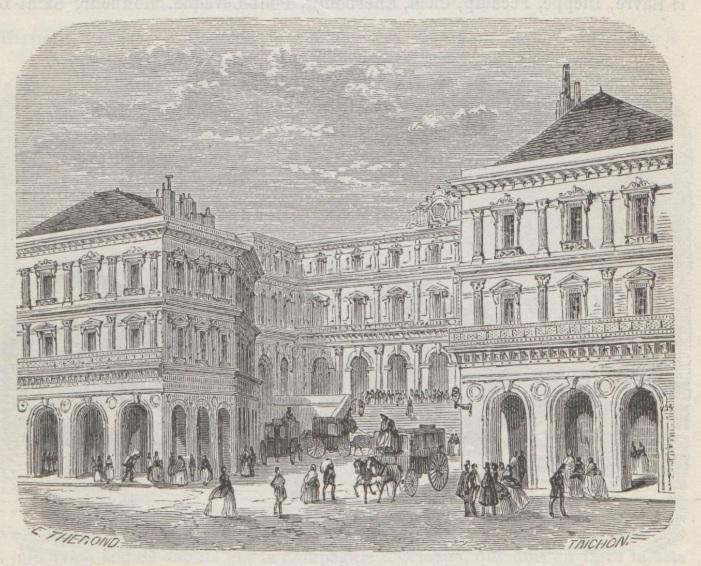 Embarcadère des chemins de fer de l'Ouest - Rive droite (gare Saint-Lazare)